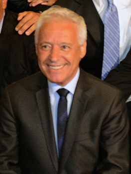 La presidenta Cristina Fernández recibe al plantel de Racing, ganador de la temporada.